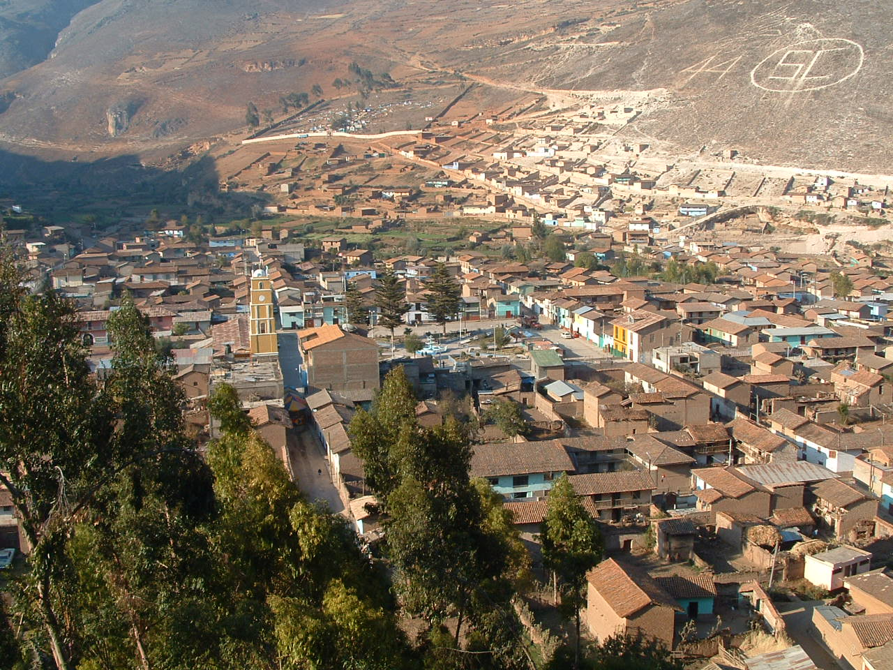 Vista panoramica de Palcamayo